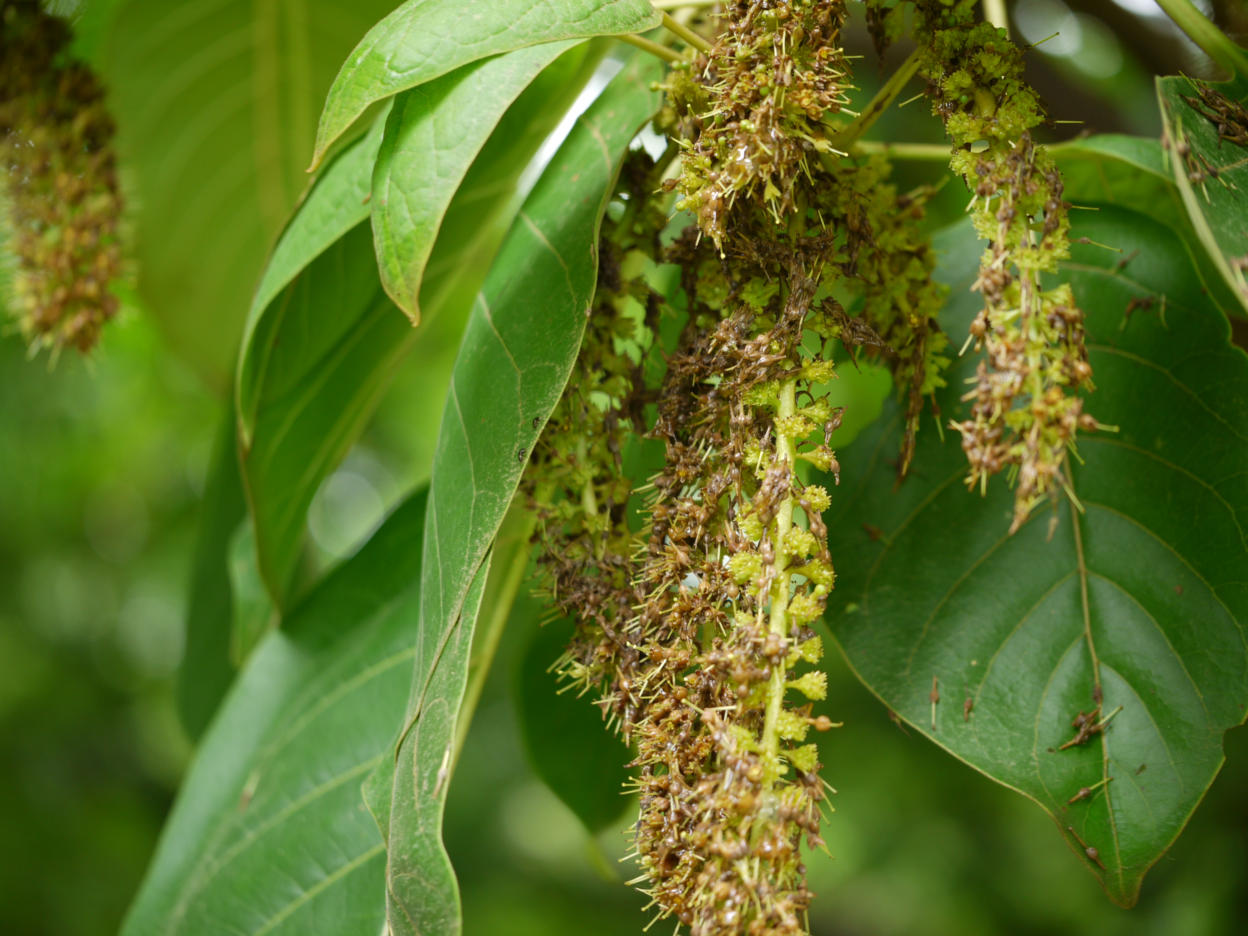 Rubiaceae (bedstraw, coffee, or madder family) » Hymenodictyon orixense hy-men-oh-DIK-tee-on -- from the Greek words hymen (skin) and diktyon (net) ¿ or-iks-EN-say ? -- Orixa, misinterpretation of Japanese name Kokusagi to Orisagi commonly known as: bridal couch plant, mountain sage • Assamese: kodam, paroli • Bengali: latikarum • Garo: bodi kiru chongipa • Gujarati: ભમ્મર છાલ bhammar chaal, લુણીયો luniyo, મધમહુડો madhamahudo • Hindi: काला बचनाग kala bachnag, भुरकुर bhurkur • Kannada: ದಿಡ್ಡಿ ಮರ diddi mara, ದೊಡ್ಡಿ ಮರ doddi mara, ಡೊಲಿ ಮರ doli mara • Khasi: dieng dohlbong sir • Konkani: दाम्डेली damdeli • Malayalam: ചക്കതേക്ക് cakkatheekk, ഇത്തിള്‍ iththil, പെരുന്തൊലി peruntholi • Marathi: भोरसाल or भोरसाळ bhorsal, भौरसाळ bhoursal, भ्रमरसाळी bhramarsali, दोंद्रु dondru, कंबळ kambal, कुडा kuda • Nepalese: लति कर्मा lati karma • Oriya: dudupa, guliya • Punjabi: barthoa • Rajasthani: lunia • Sanskrit: भ्रमरछल्ली bhramarchalli, भृङ्गःवृक्ष bhringah-vriksha, उग्रगन्ध ugragandha • Tamil: வெள்ளைக்கடம்பு vellai-k-katampu • Telugu: బందారుచెట్టు bandaaru-chettu Native to: Bangladesh, India, Nepal, Sri Lanka, Myanmar, Thailand, Vietnam, Philippines References: NPGS • World Agroforestry Centre • ENVIS • Forest Flora of Hyderabad State